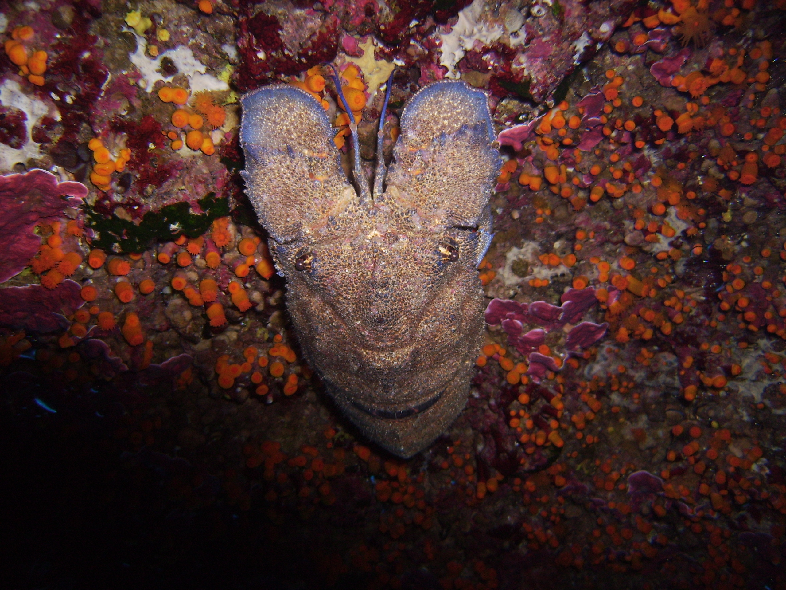 Bärenkrebs